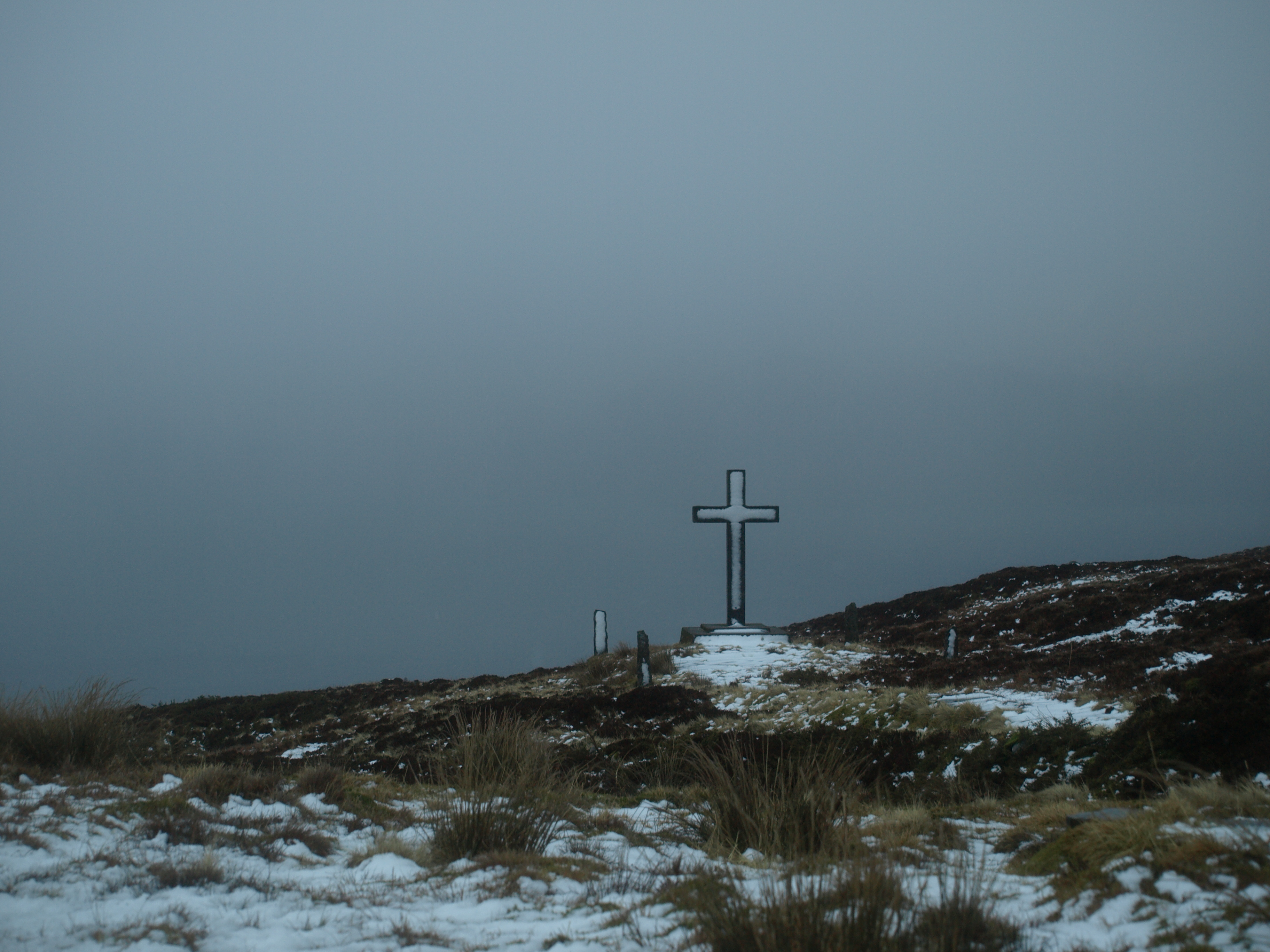 Dragseidet, Stadtlandet